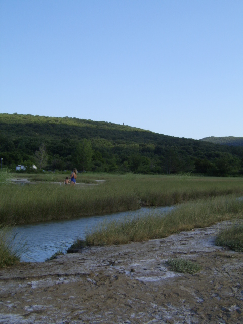 Otok Krk. Detalj s pješćanika Meline u uvali Soline. Vidi se Veli Potok prije samog ušća u uvalu Soline.